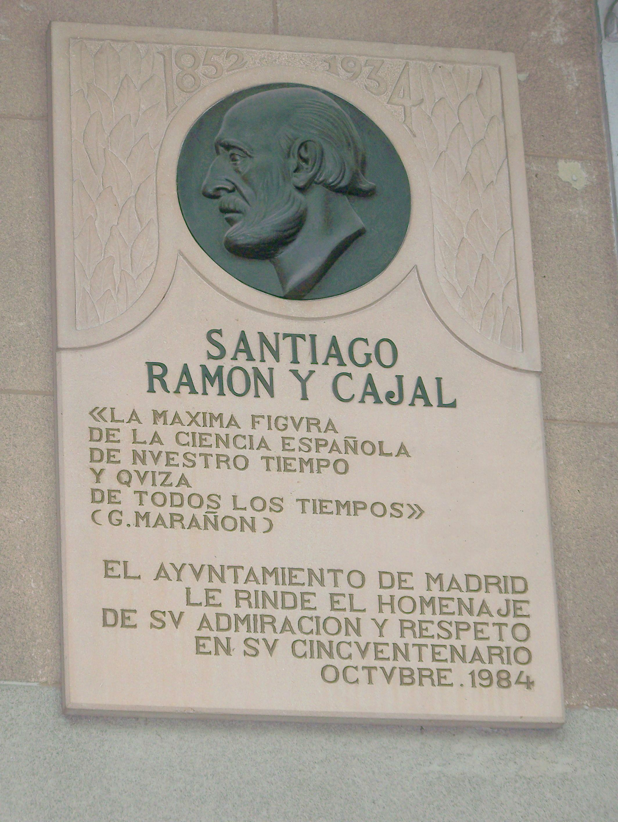 Casa de S. Ramón y Cajal en Madrid, calle de Alfonso XII, 64 , donde vivío a partir del año 1912: Placa conmemorativa.